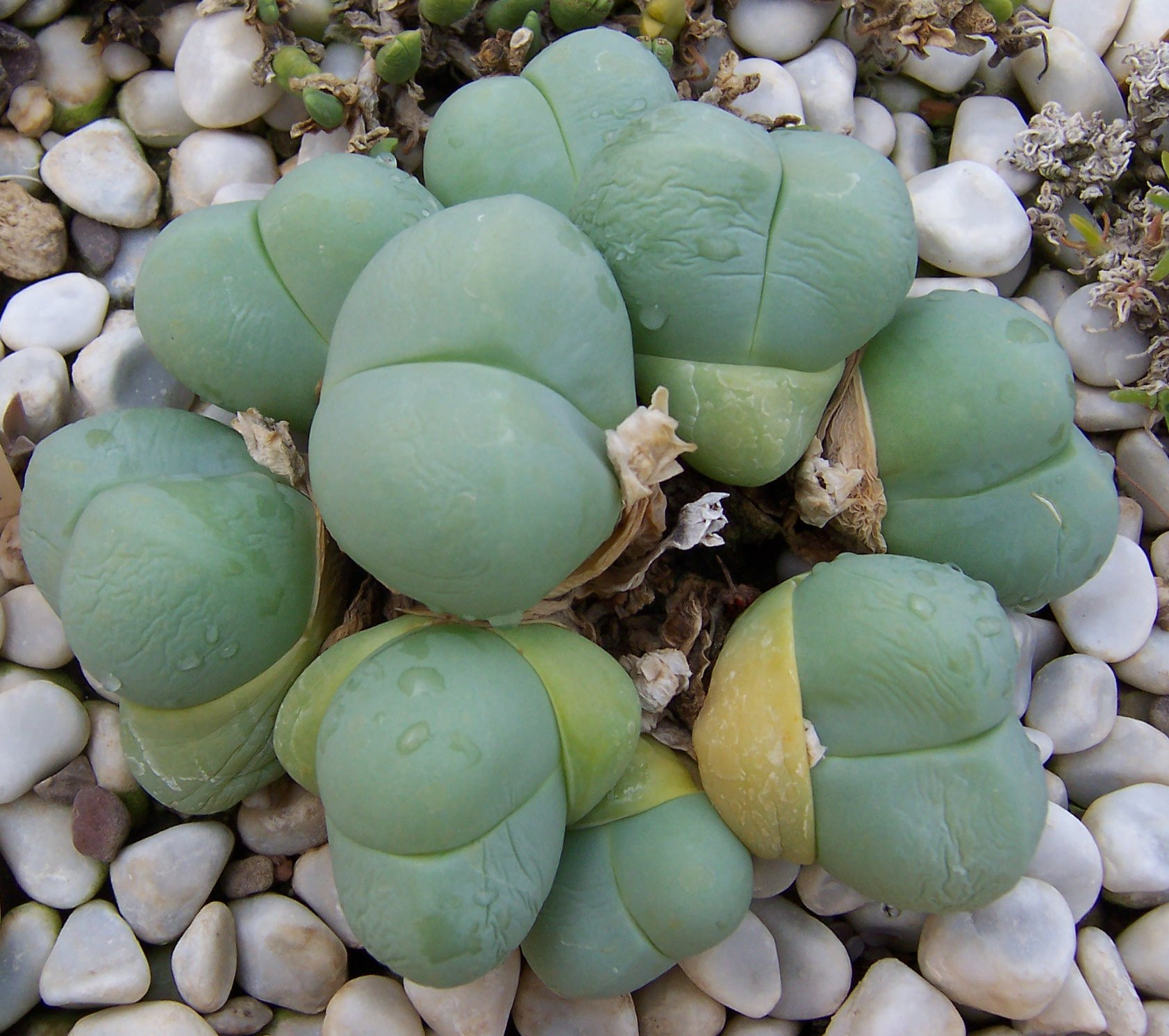 Gibbaeum heathii, habitus